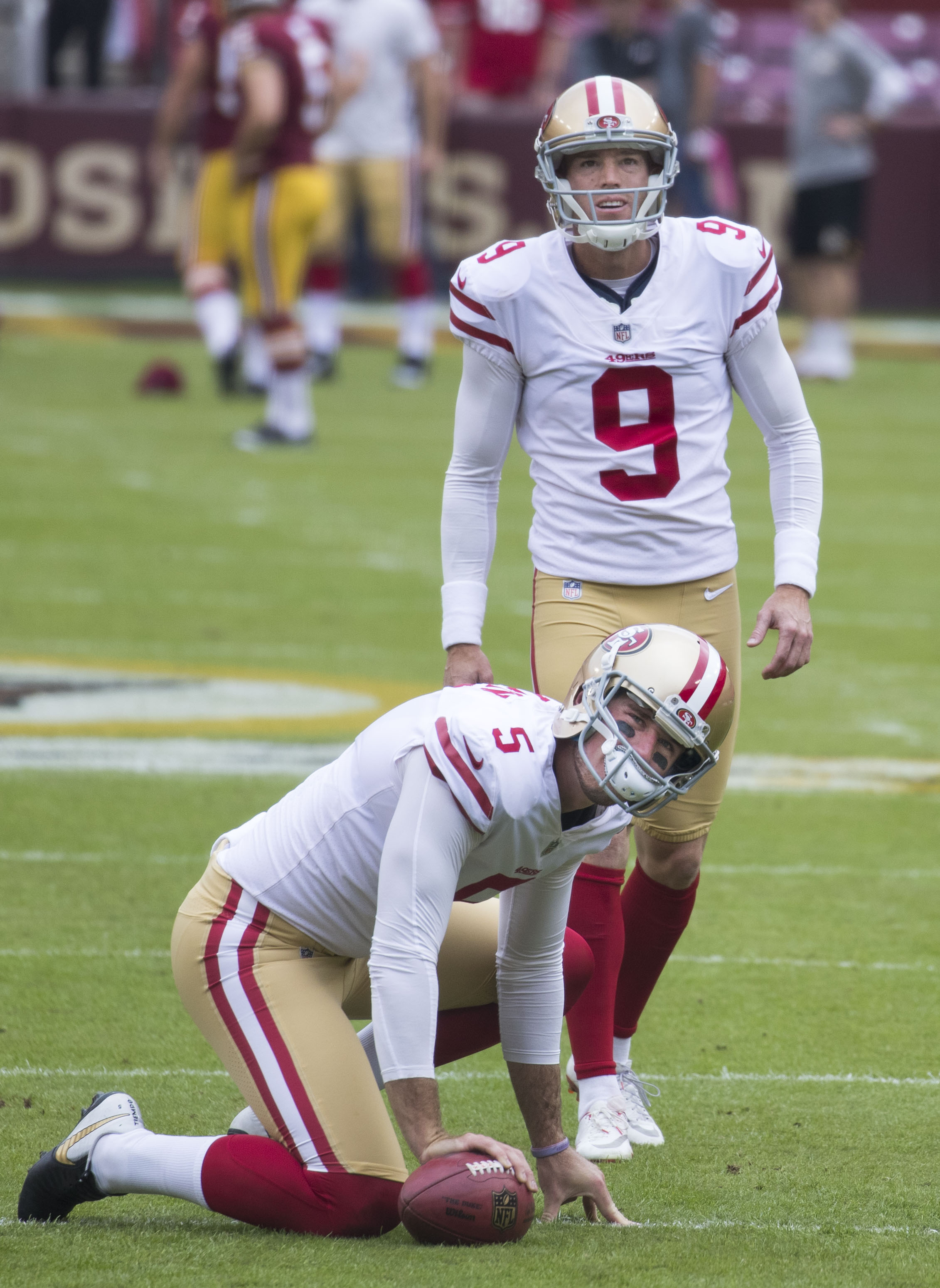 49ers at Redskins 10/15/17